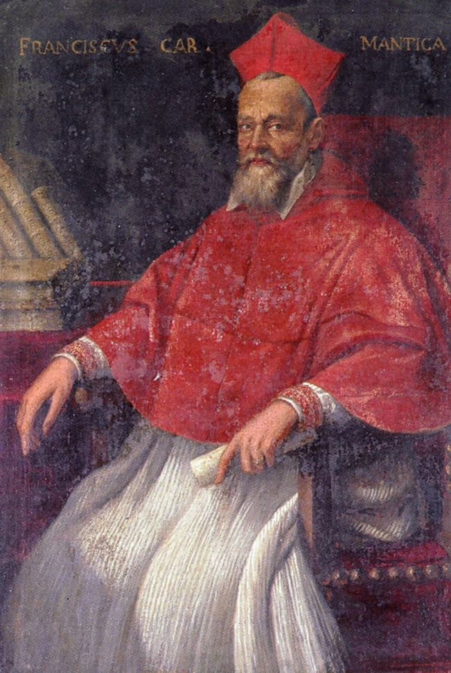 Anonimo, Ritratto del cardinale Francesco Maria Mantica, olio su tela (Udine, Società filologica friulana).